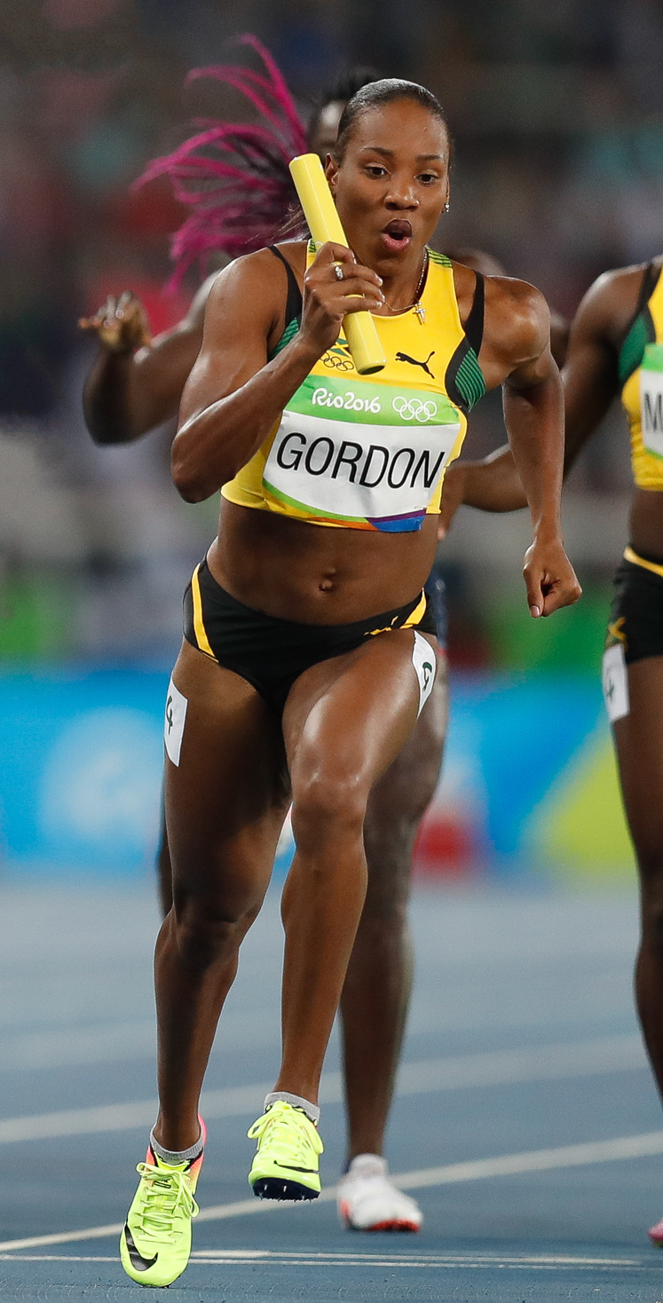 Rio de Janeiro - Eliminatórias do revezamento 4 x 400m nos Jogos Rio 2016, no Estádio Olímpico (Fernando Frazão/Agência Brasil)